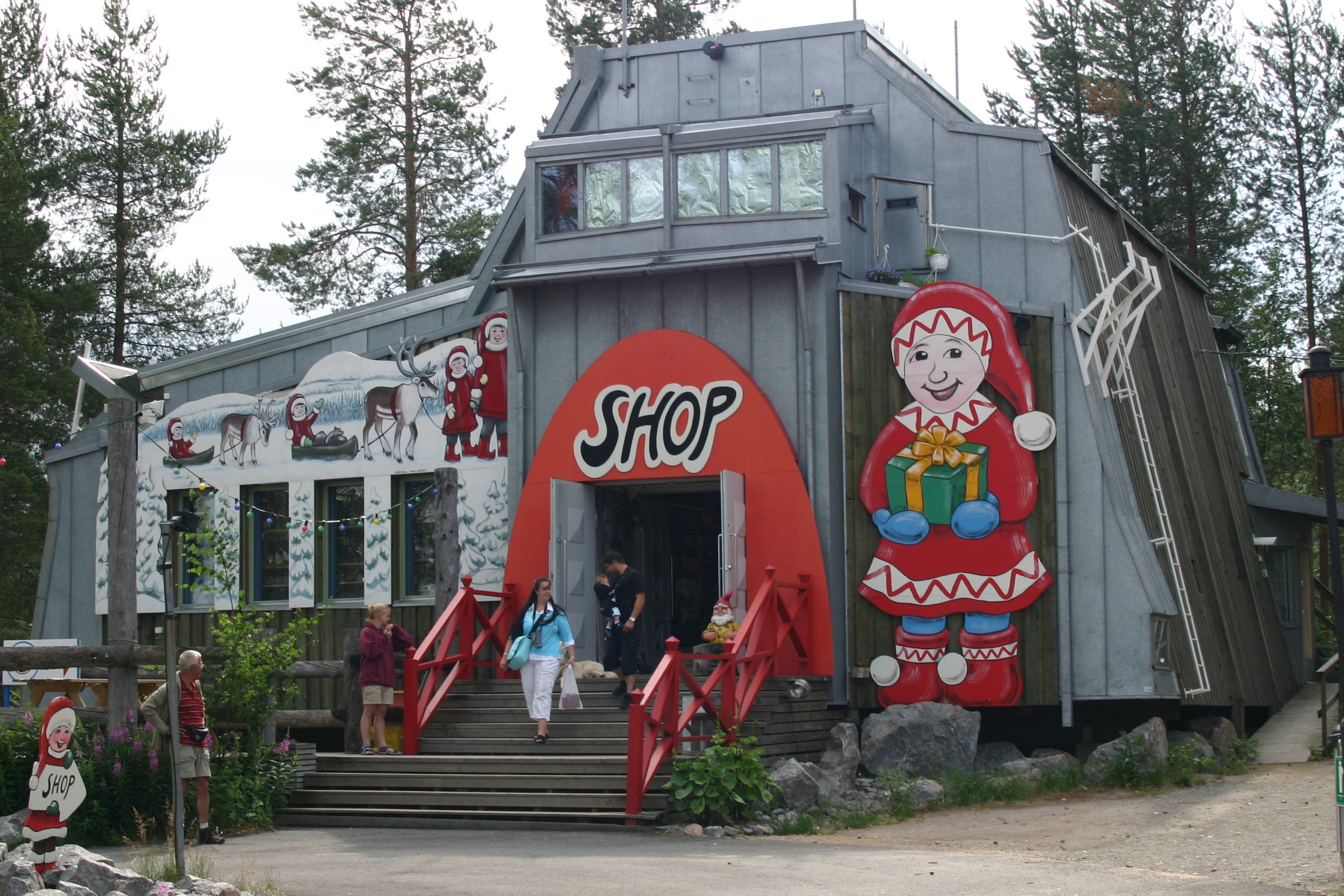 Shop at Santa Claus' Workshop Village (Joulupukin Pajakyla) near Rovaniemi